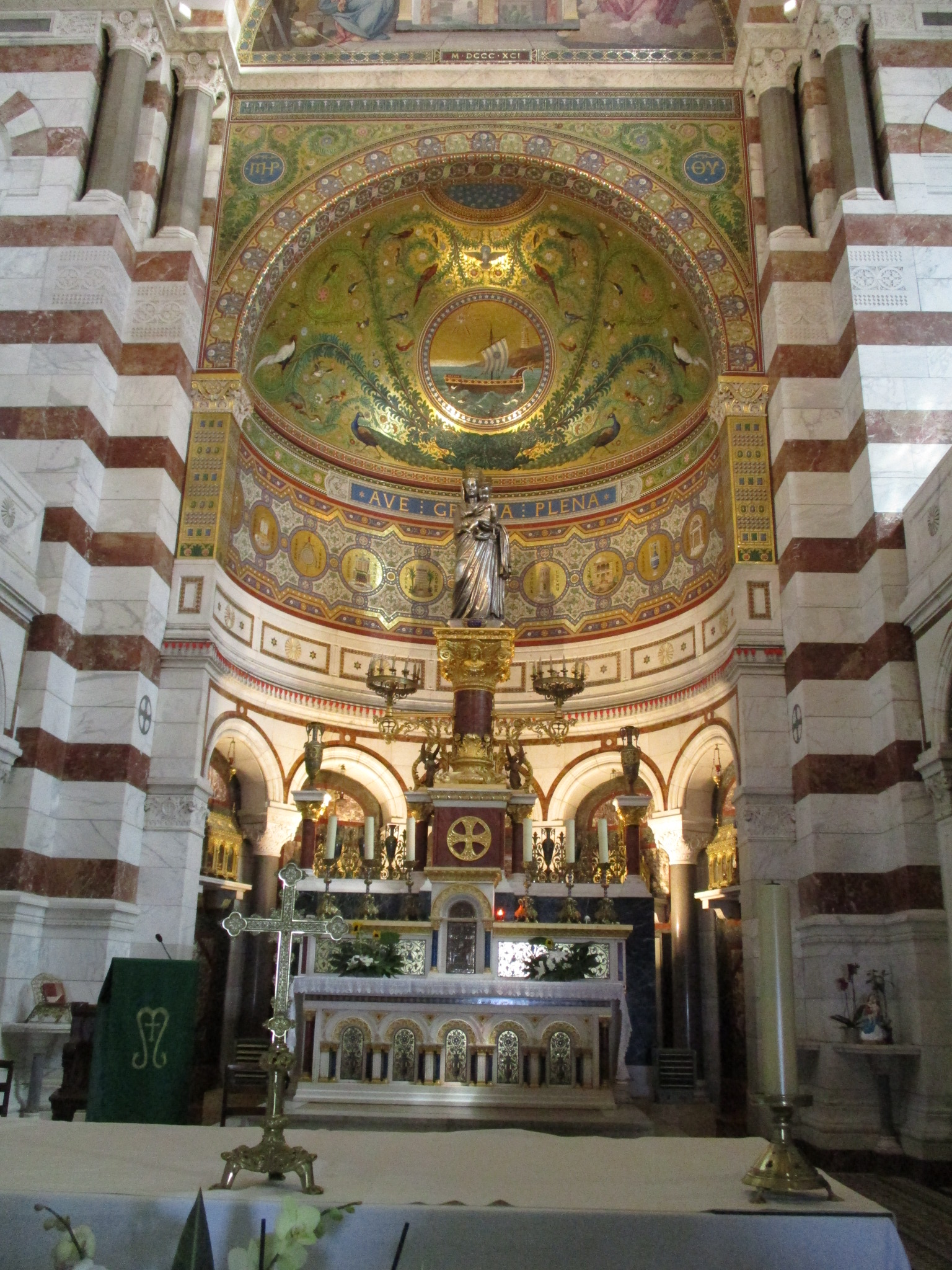 Basilique Notre-Dame de la Garde